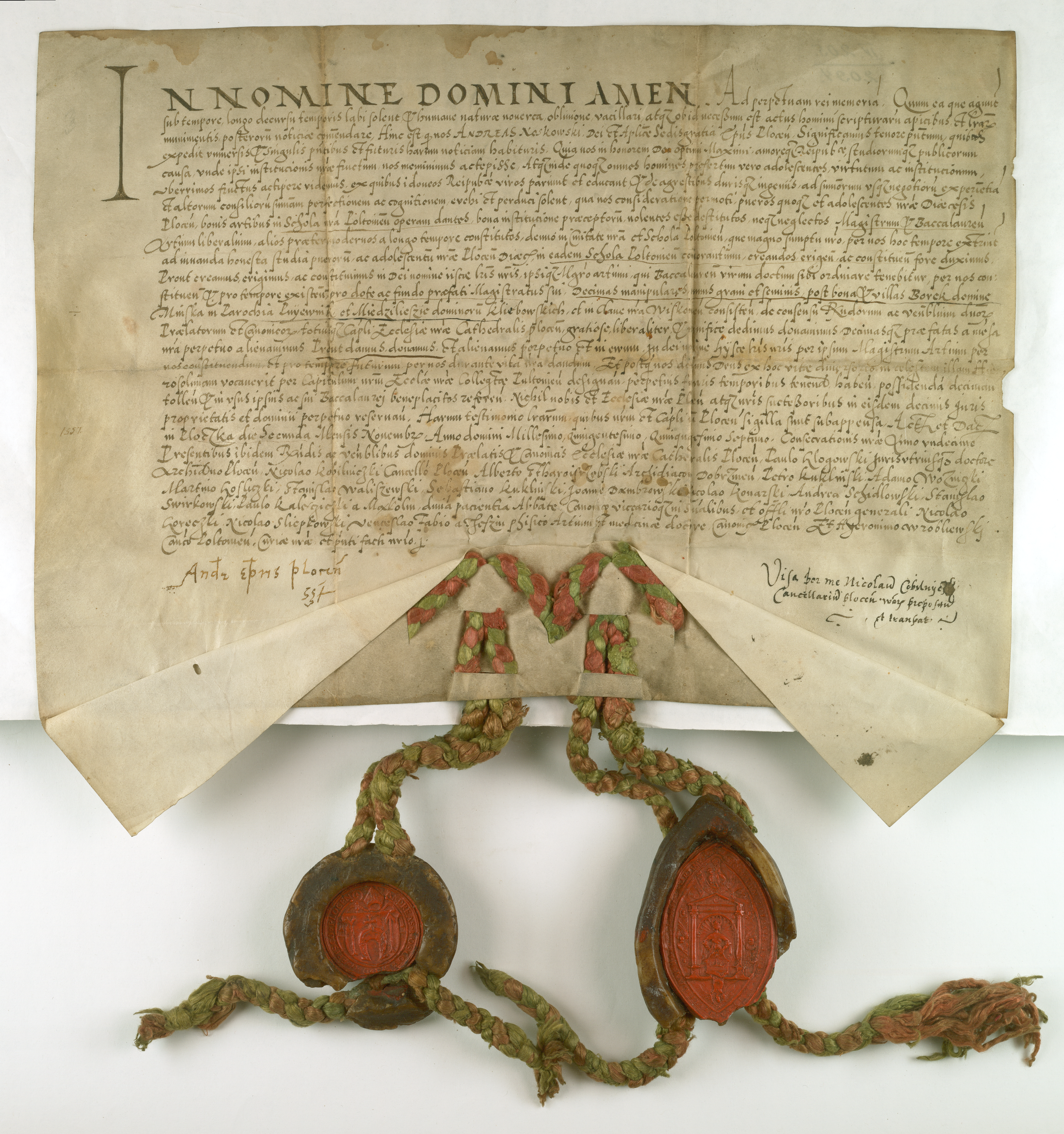 Andrzej Noskowski, biskup płocki, uposaża szkołę w Pułtusku dziesięciną snopową z dóbr Borek i Międzylesie, oraz dóbr stołu biskupiego z klucza Witkowskiego.